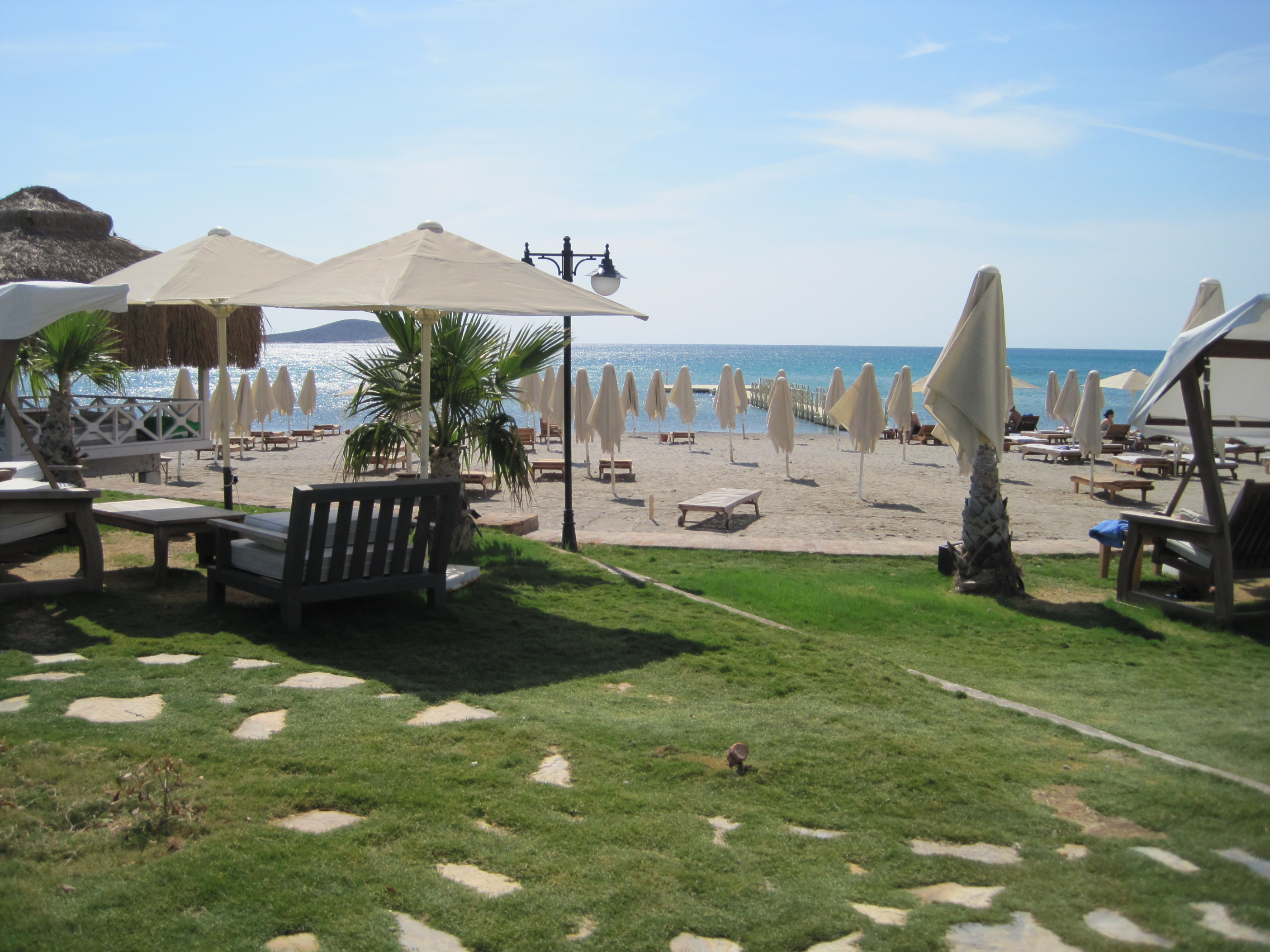 35930 Alaçatı Belediyesi/Çeşme/İzmir, Turkey